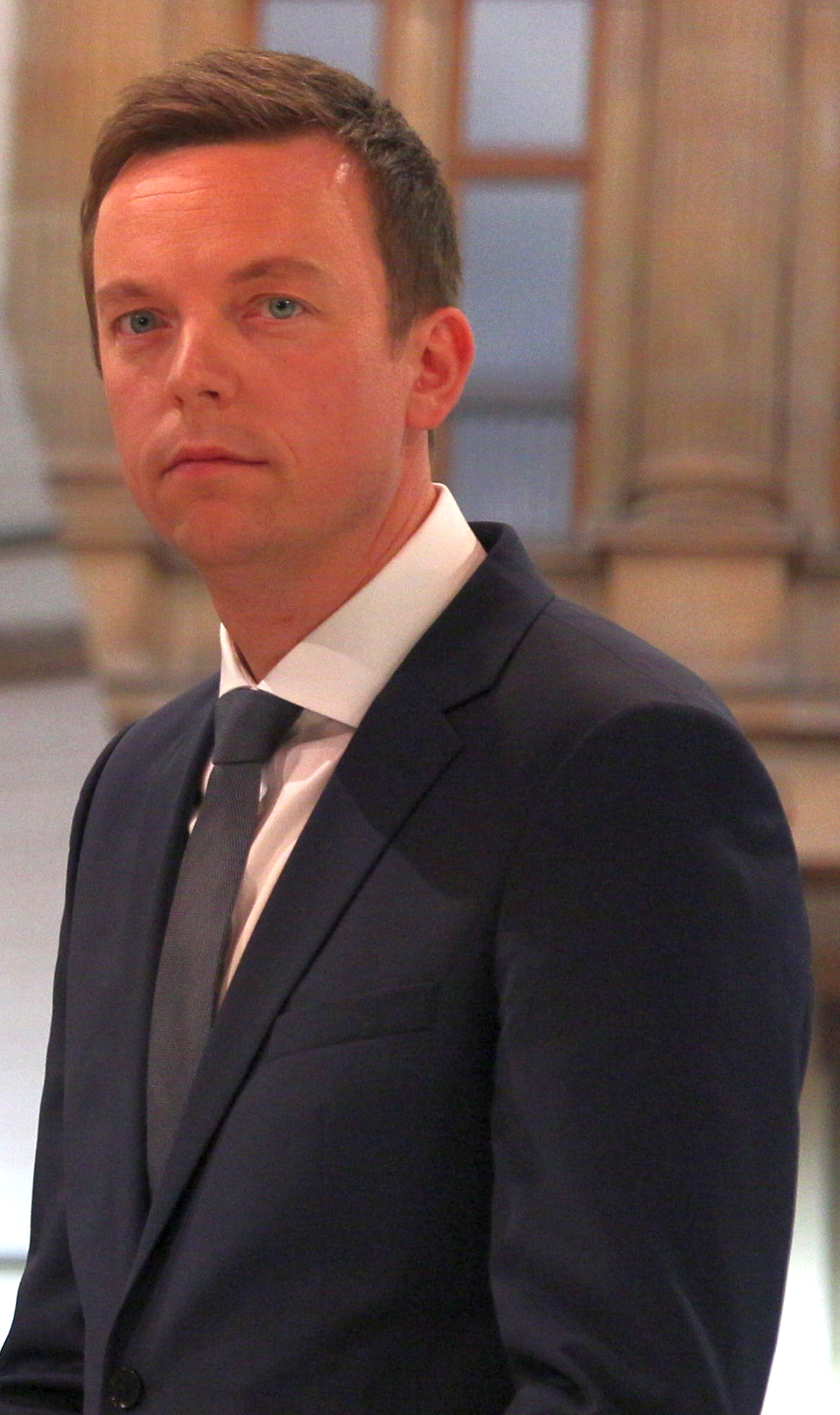 Tobias Hans (CDU) beim Wahlabend zur Landtagswahl im Saarland